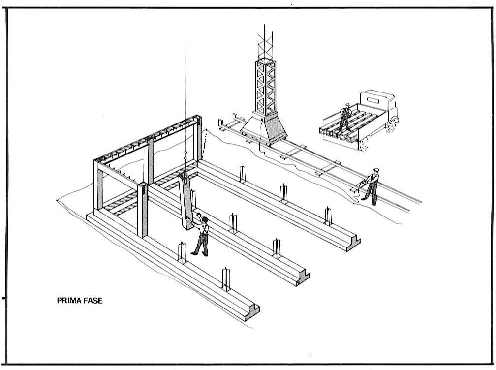 Structurapid - prima fase